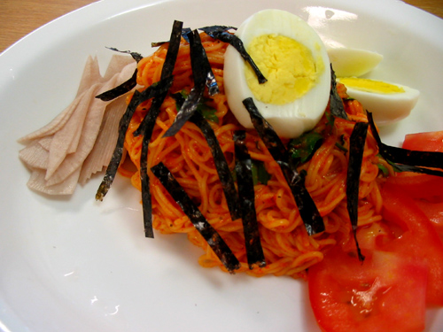 Korean_noodle-Bibim guksu